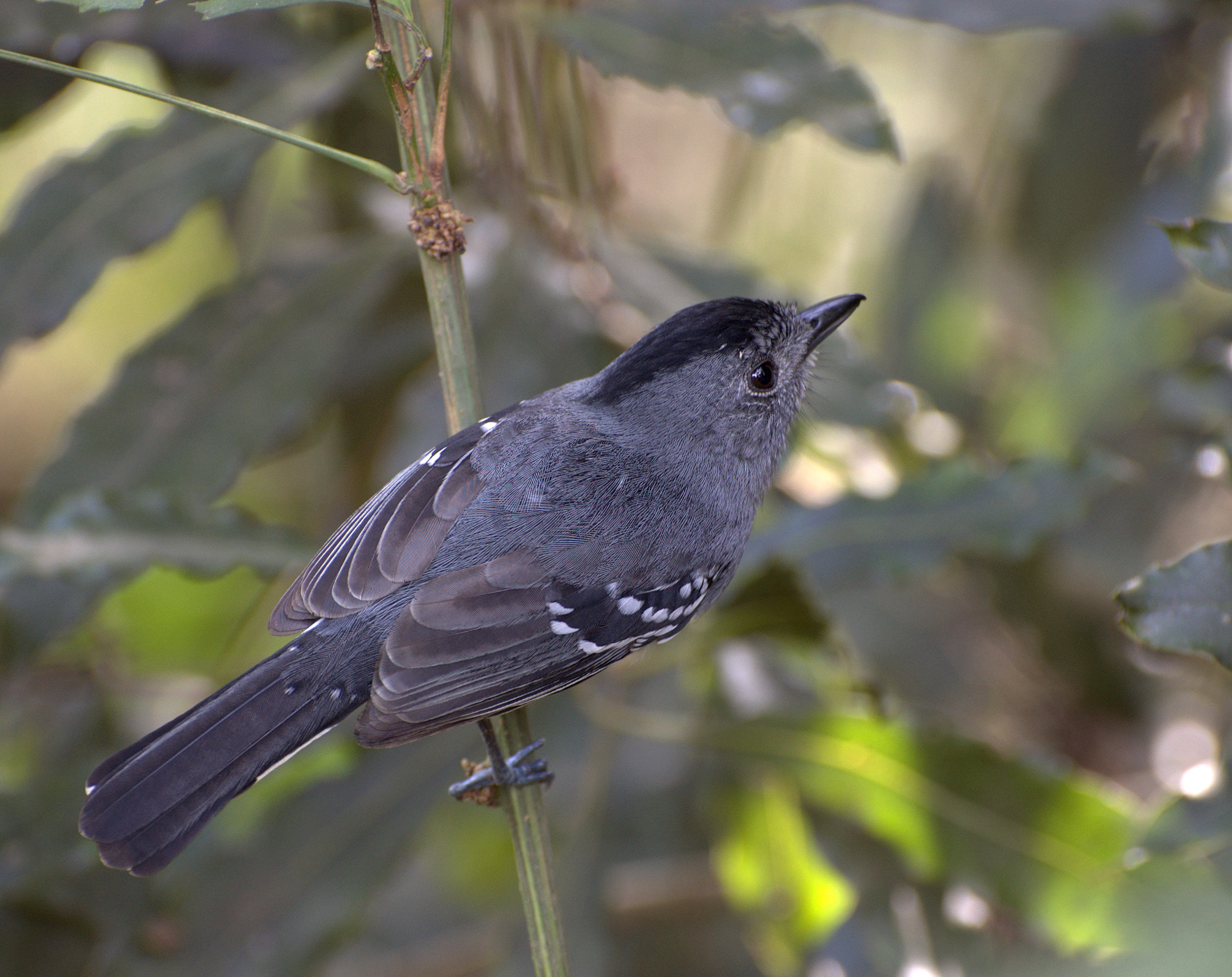 Horto Florestal de São Paulo